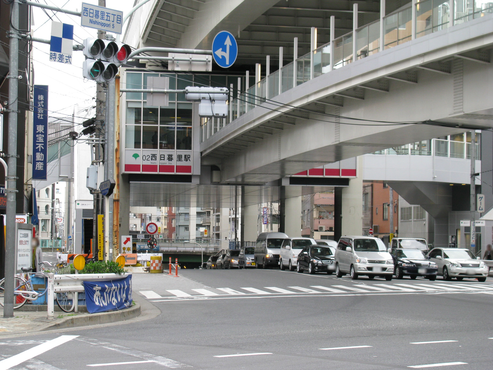 日暮里・舎人ライナー西日暮里駅